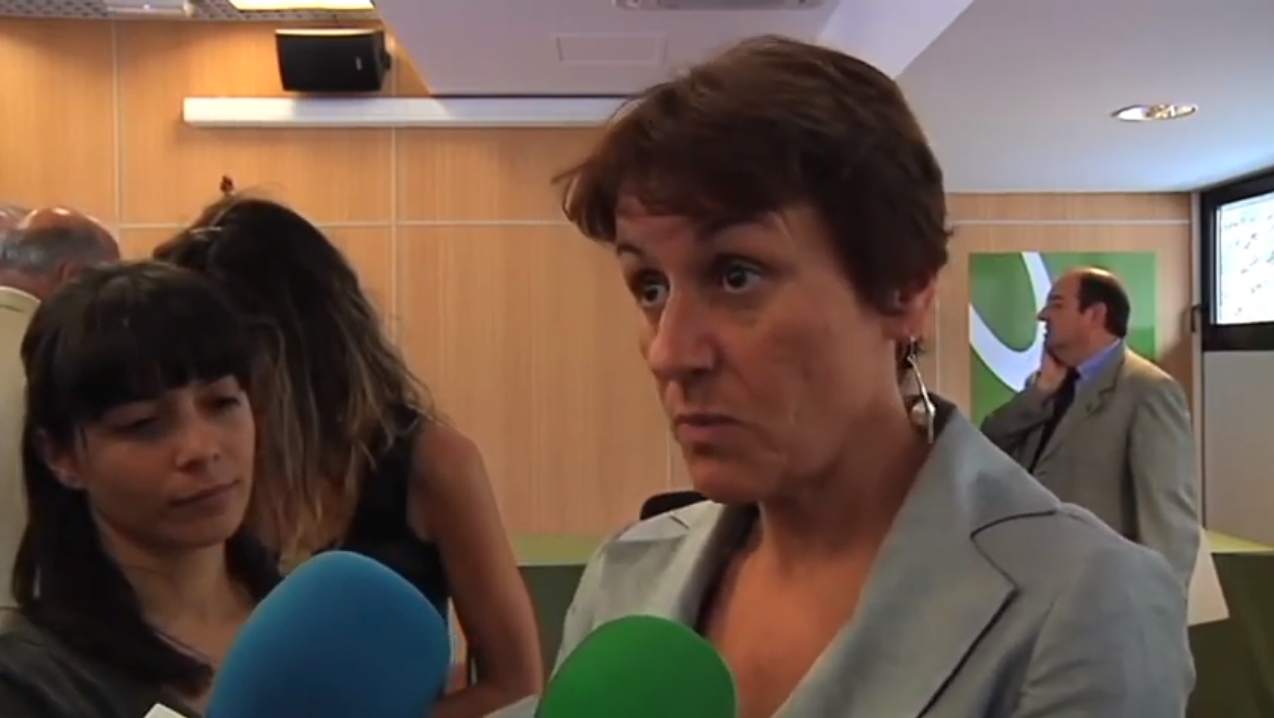 La política andorrana Roser Suñé Pascuet atén els mitjans en un acte a la Universitat d'Andorra el 2011, com a ministra d'Educació del govern d'Andorra.